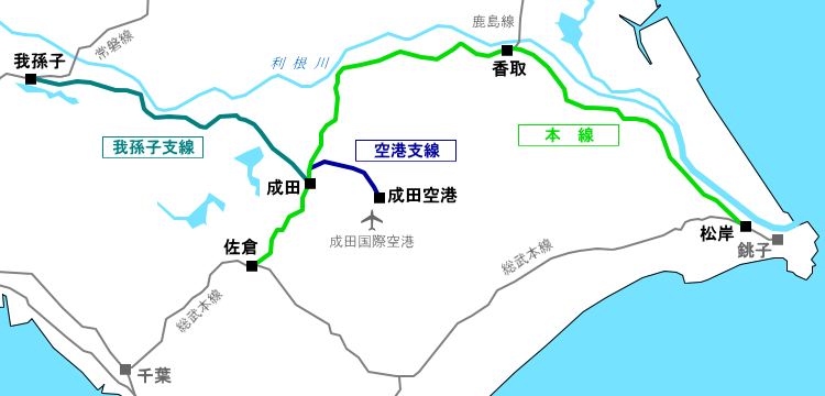 JR成田線路線図